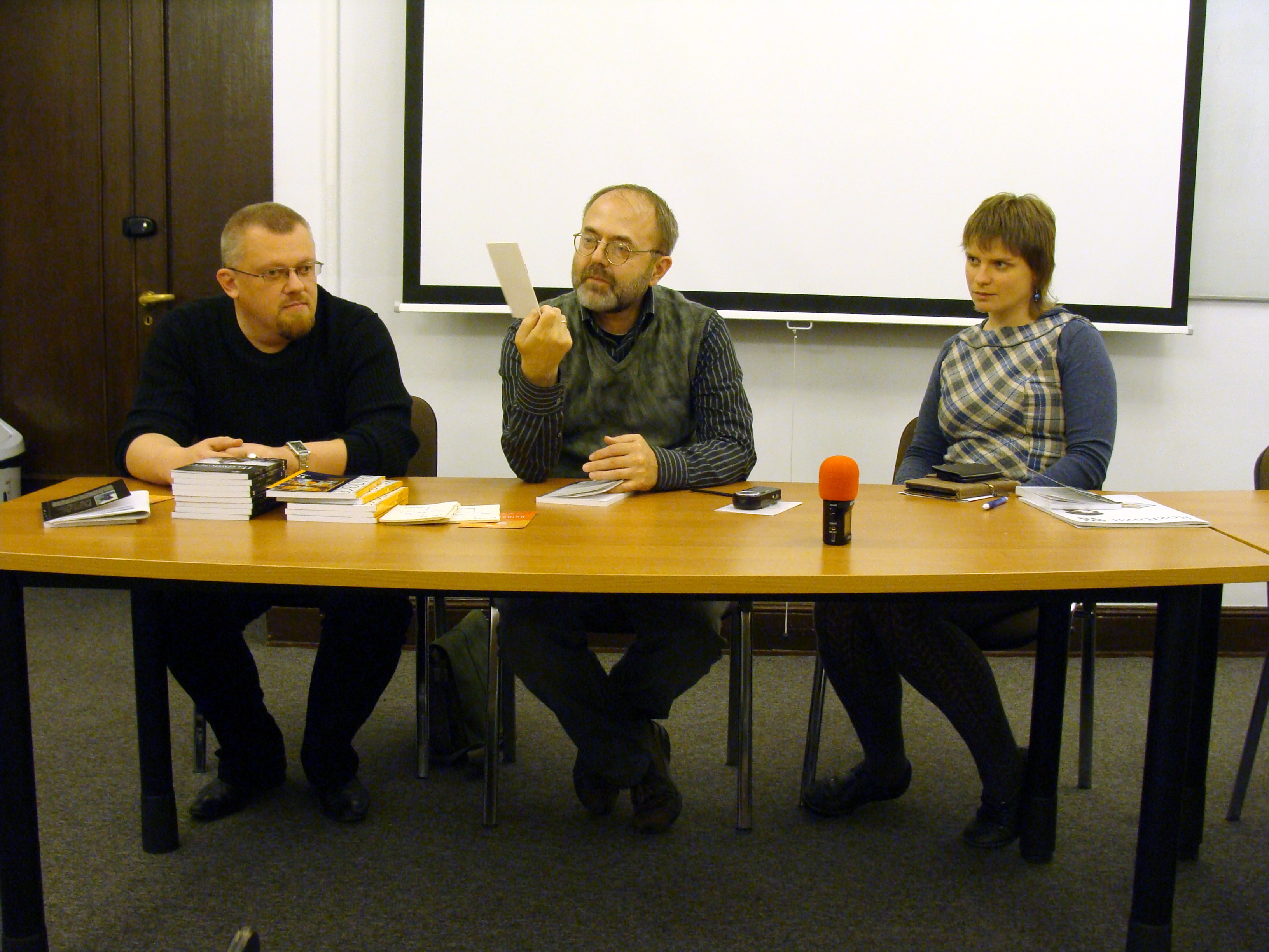 Jurka Humianiuk, białoruski poeta, Aleś Arkusz, białoruski poeta, prozaik, eseista i wydawca oraz Tacciana Niadbaj, literaturoznawca, podczas prezentacji powieści Alesia Arkusza "Palimpsiest" w Collegium Civitas w Pałacu Kultury i Nauki w Warszawie.